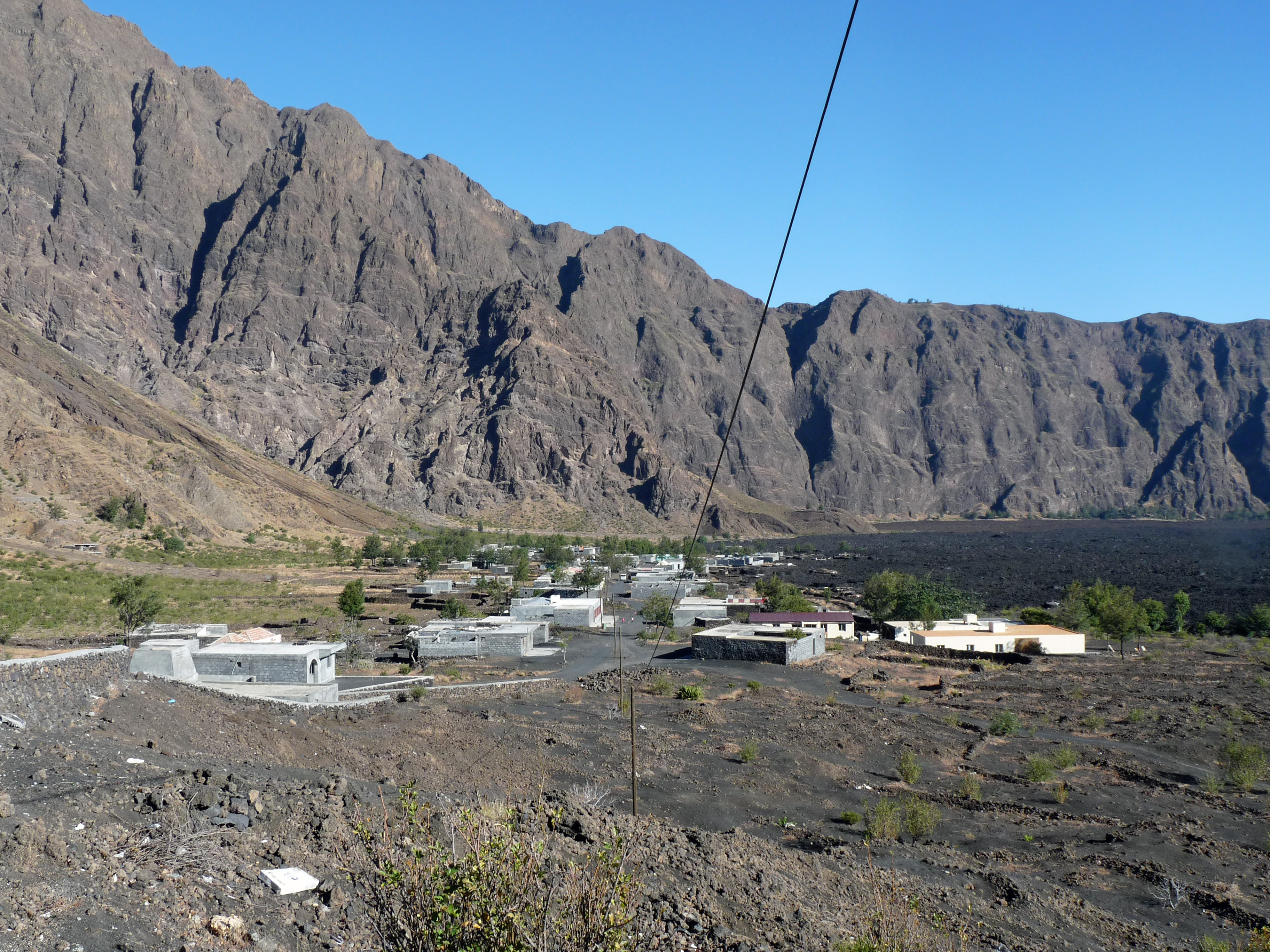 Chã das Caldeiras (île de Fogo, Cap-Vert) : village de Bangaeira